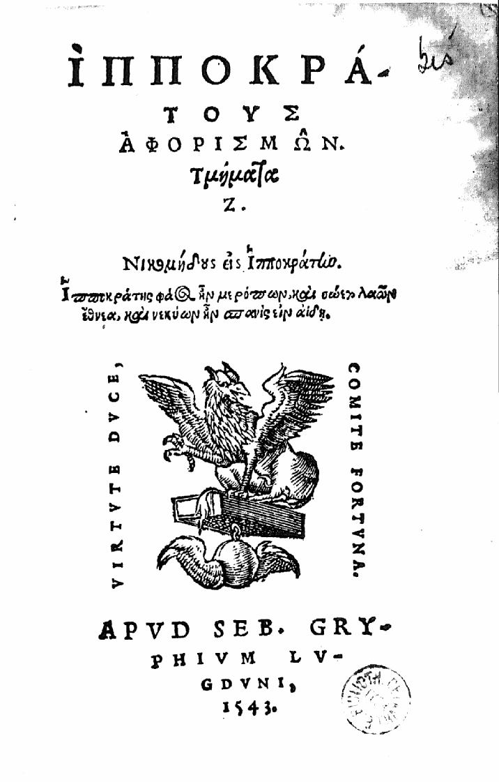 Titre de l'édition des Aphorismes d'Hippocrate par F. Rabelais, Lyon, 1543